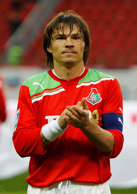 Лоськов